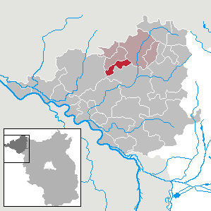 Gülitz-Reetz in Brandenburg (Country) - District Prignitz